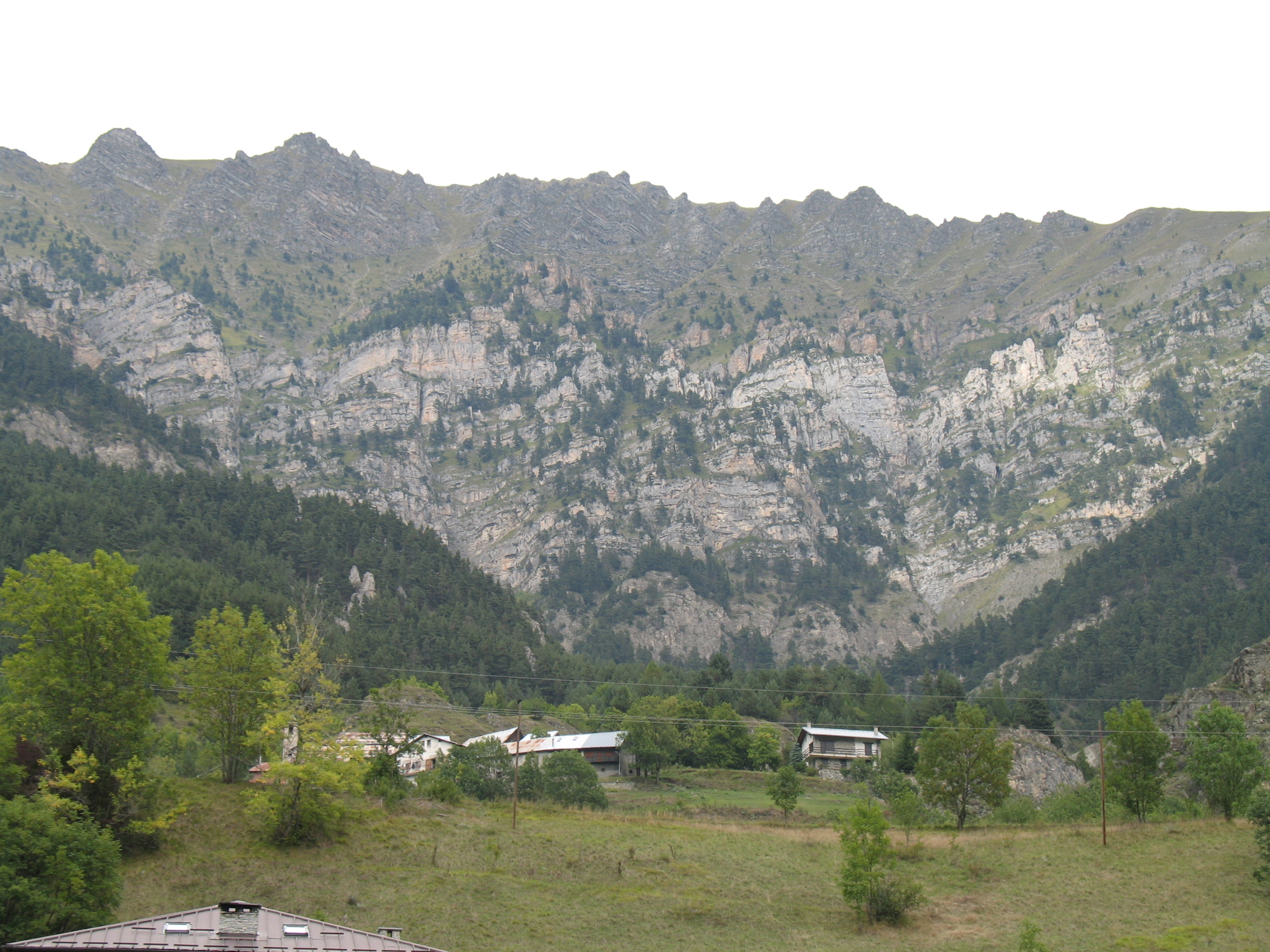 Immagine da Pietraporzio, valle Stura di Demonte, in provincia di Cuneo, Piemonte, Italia